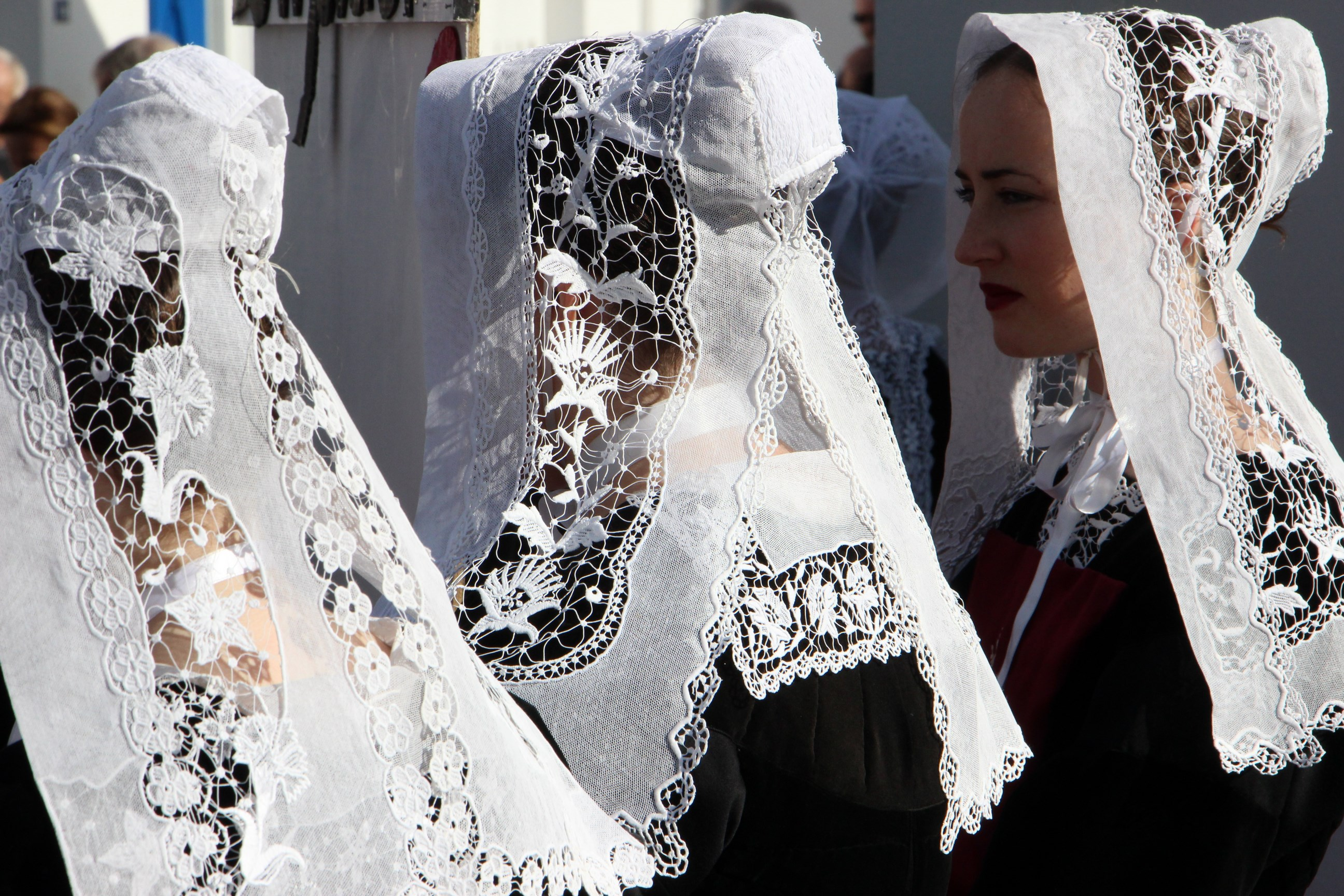 Coiffes de cérémonie de 1980-1920